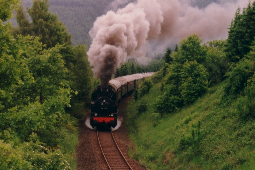 94 1292 zwischen Haiger und Flammersbach